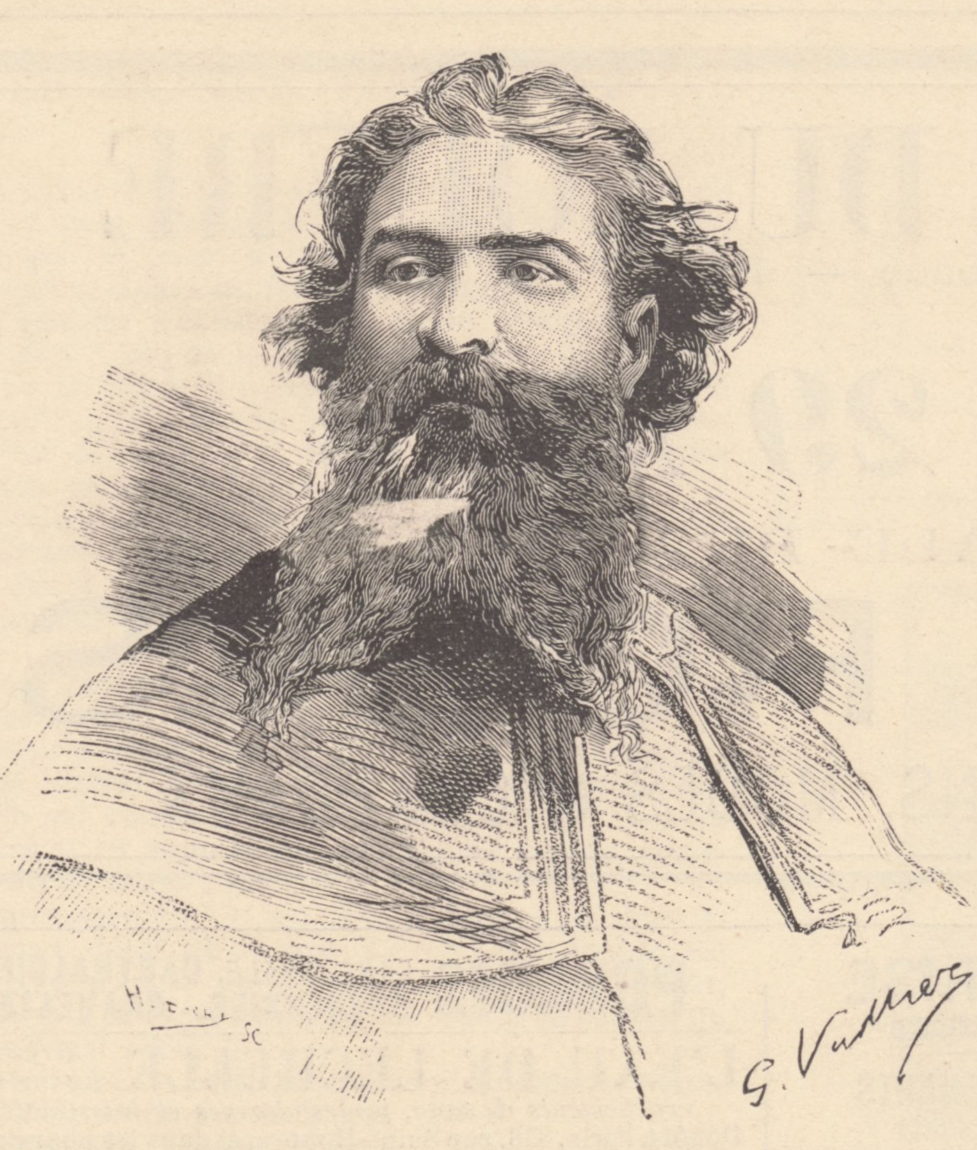 M. Samuel Urrabieta.